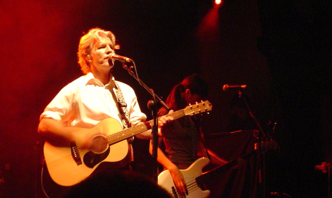 NZ singer Tim Finn live in Dublin, 16 March 2007